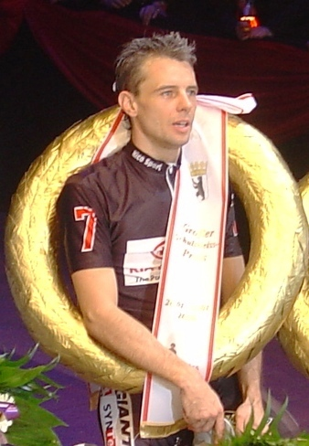 Robert Slippens, 6-Tage-Rennen Berlin 2006